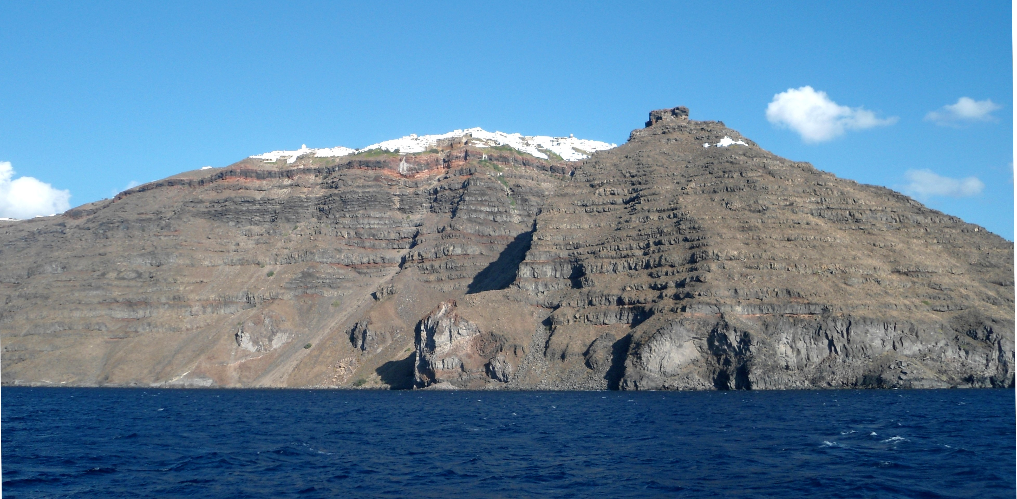 Imerovigli Skaros Santorini